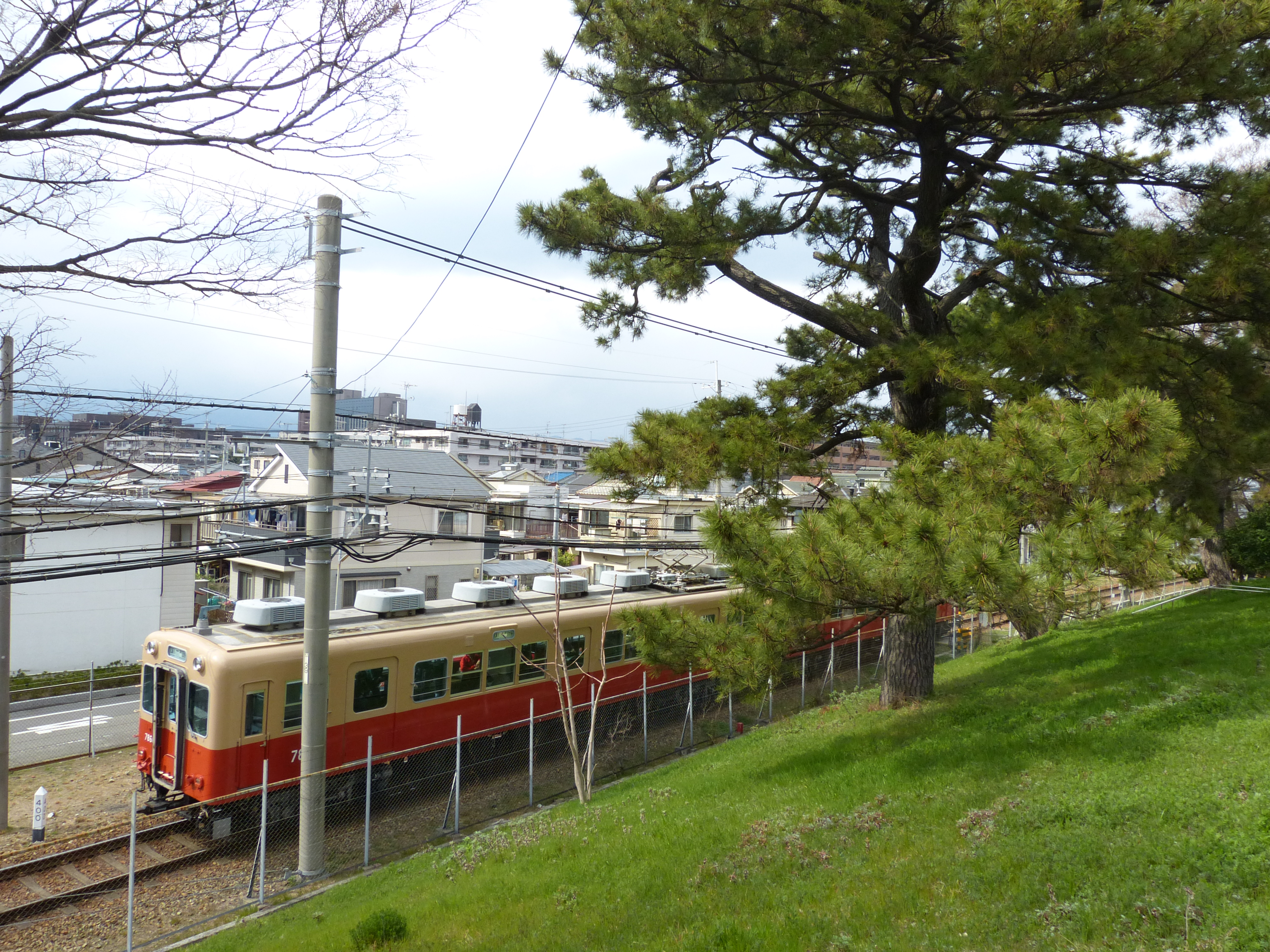 阪神武庫川線を走る7801形電車。手前は武庫川の堤防と松の木。 東鳴尾駅付近にて撮影。